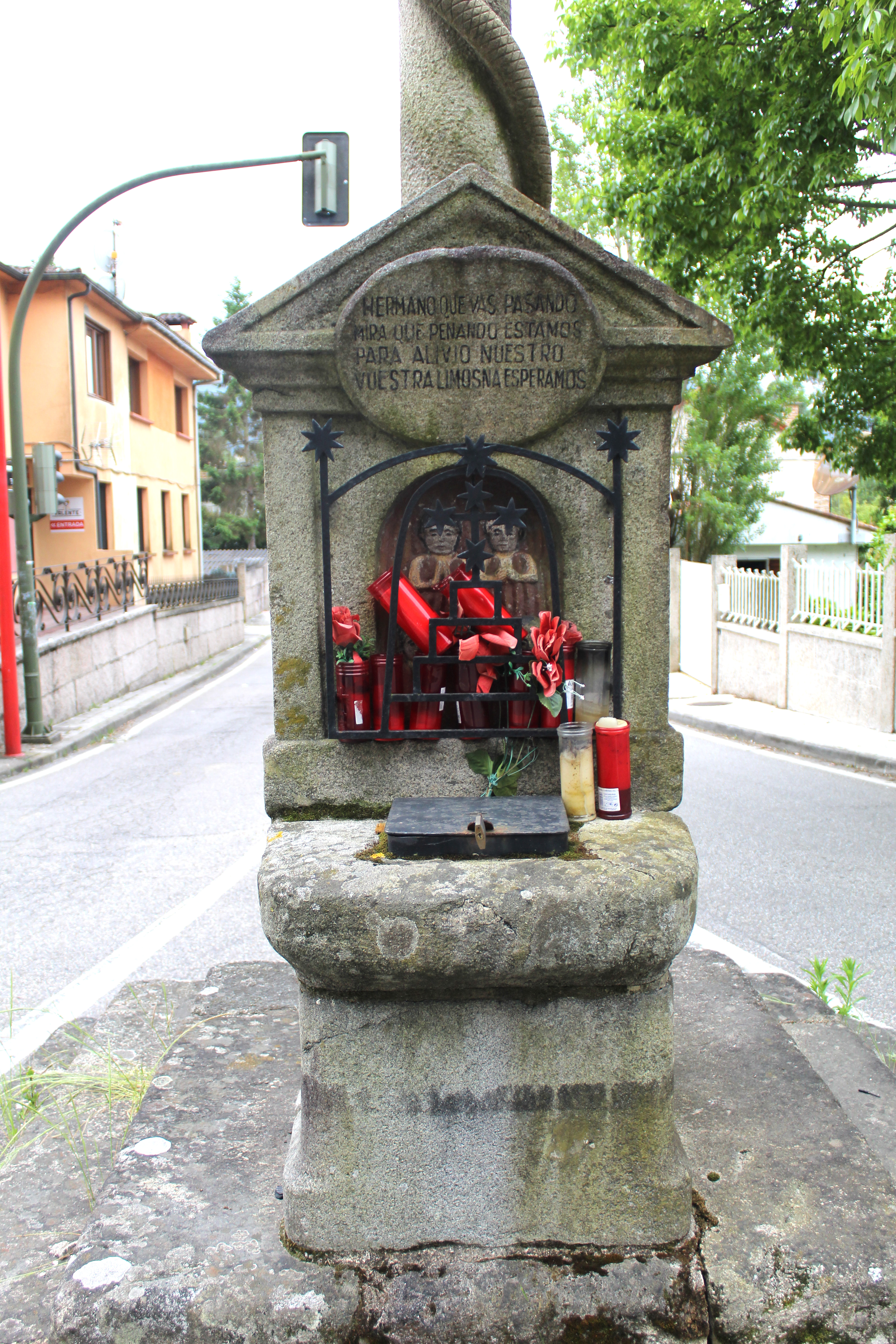 Peto de ánimas no Cruceiro do Acordo en Mañufe